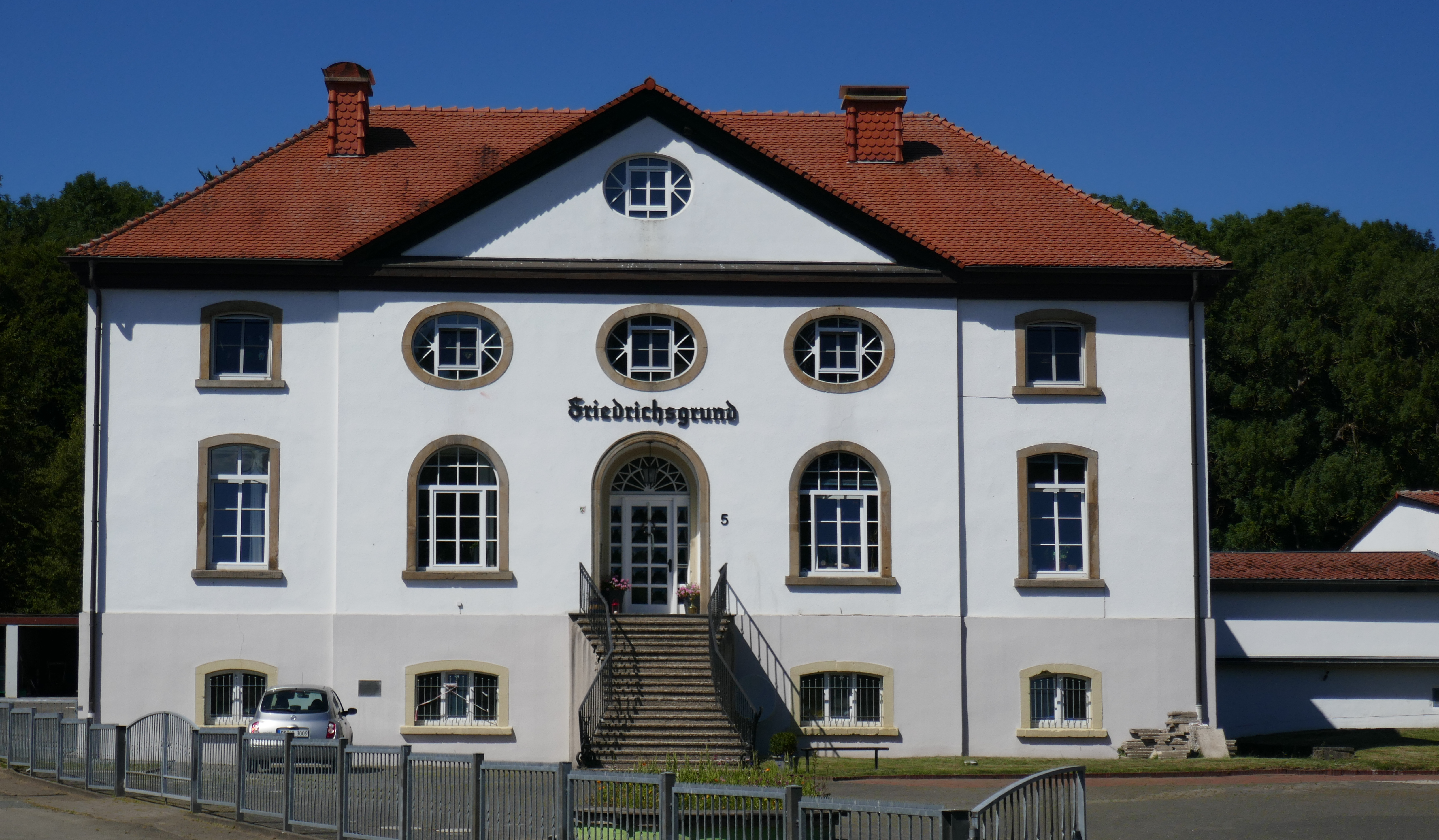 Gutshaus Friedrichsgrund zwischen Fürstenberg und Dalheim